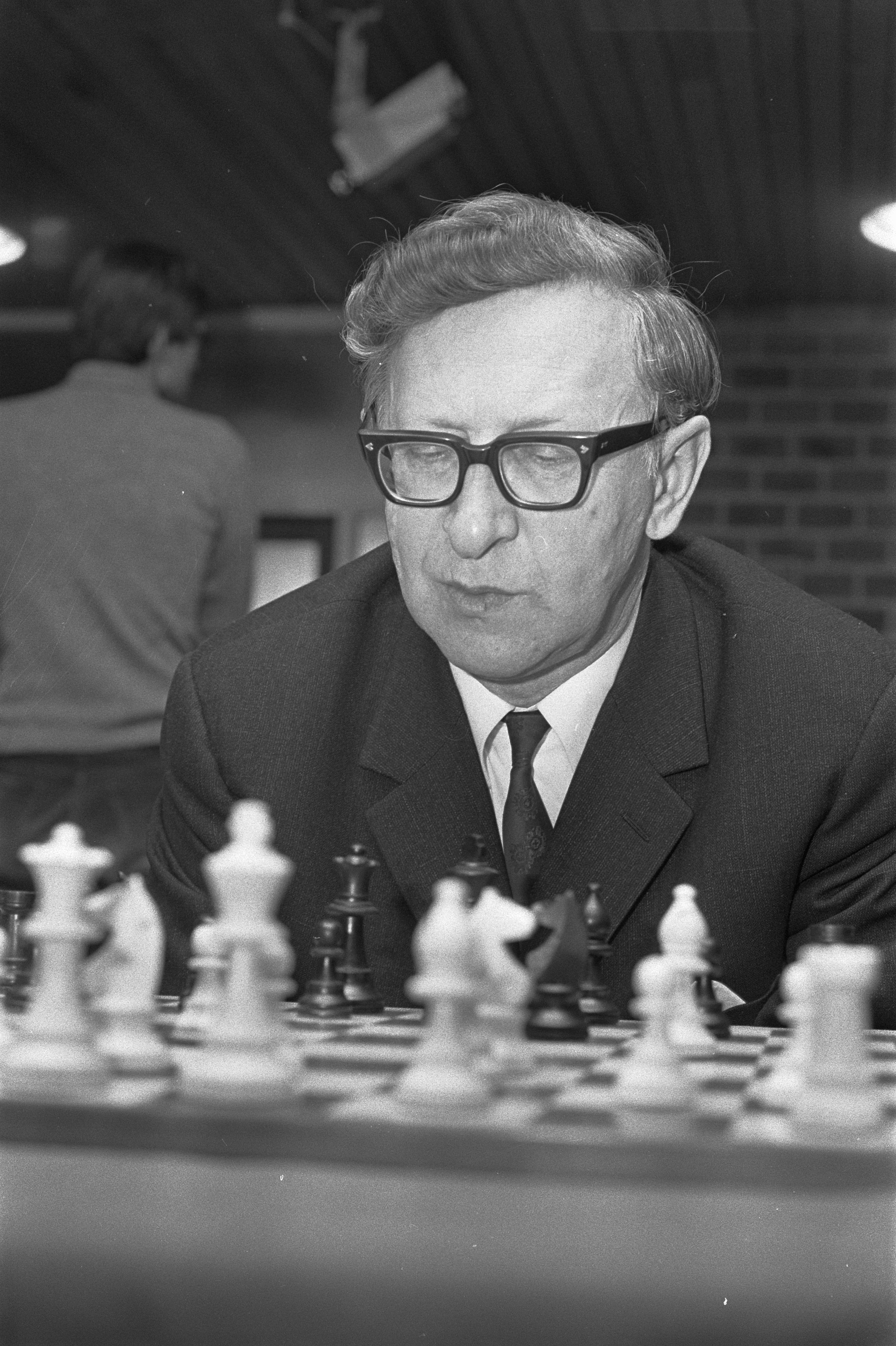 Collectie / Archief : Fotocollectie Anefo Reportage / Serie : [ onbekend ] Beschrijving : Hoogovenschaaktoernooi, Smyslov (USSR), kop Datum : 11 januari 1972 Trefwoorden : schaken Instellingsnaam : Hoogovenschaaktournooi Fotograaf : Verhoeff, Bert / Anefo Auteursrechthebbende : Nationaal Archief Materiaalsoort : Negatief (zwart/wit) Nummer archiefinventaris : bekijk toegang 2.24.01.05 Bestanddeelnummer : 925-3008